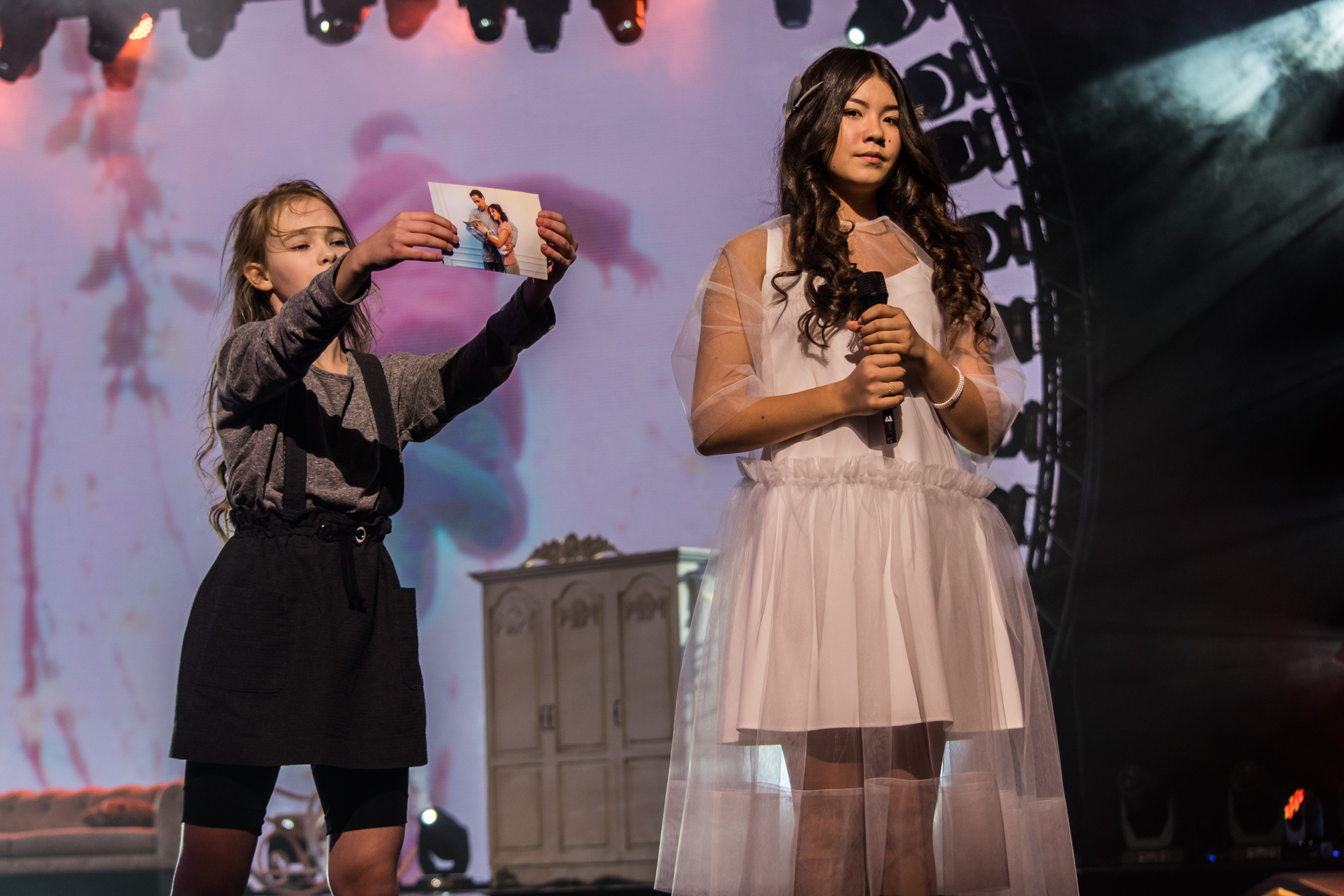 Полина Богусевич на первой костюмированной репетиции Детского Евровидения 2017